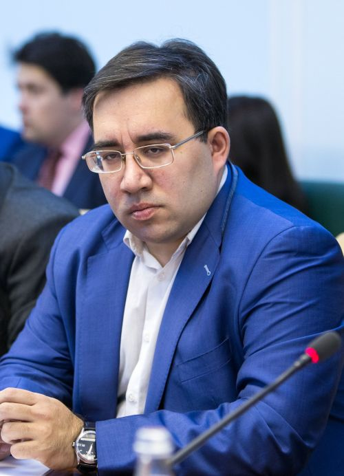 Александр Решидеович Дюков, российский историк